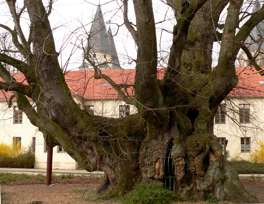 Stiftskirche St. Peter und Paul (Kaiserdom) Königslutter